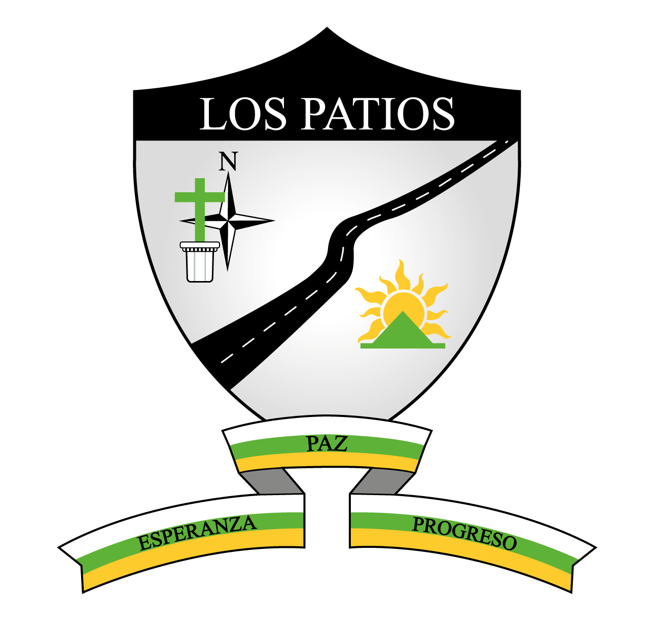 Escudo del municipio de Los Patios, Norte de Santander, Colombia.